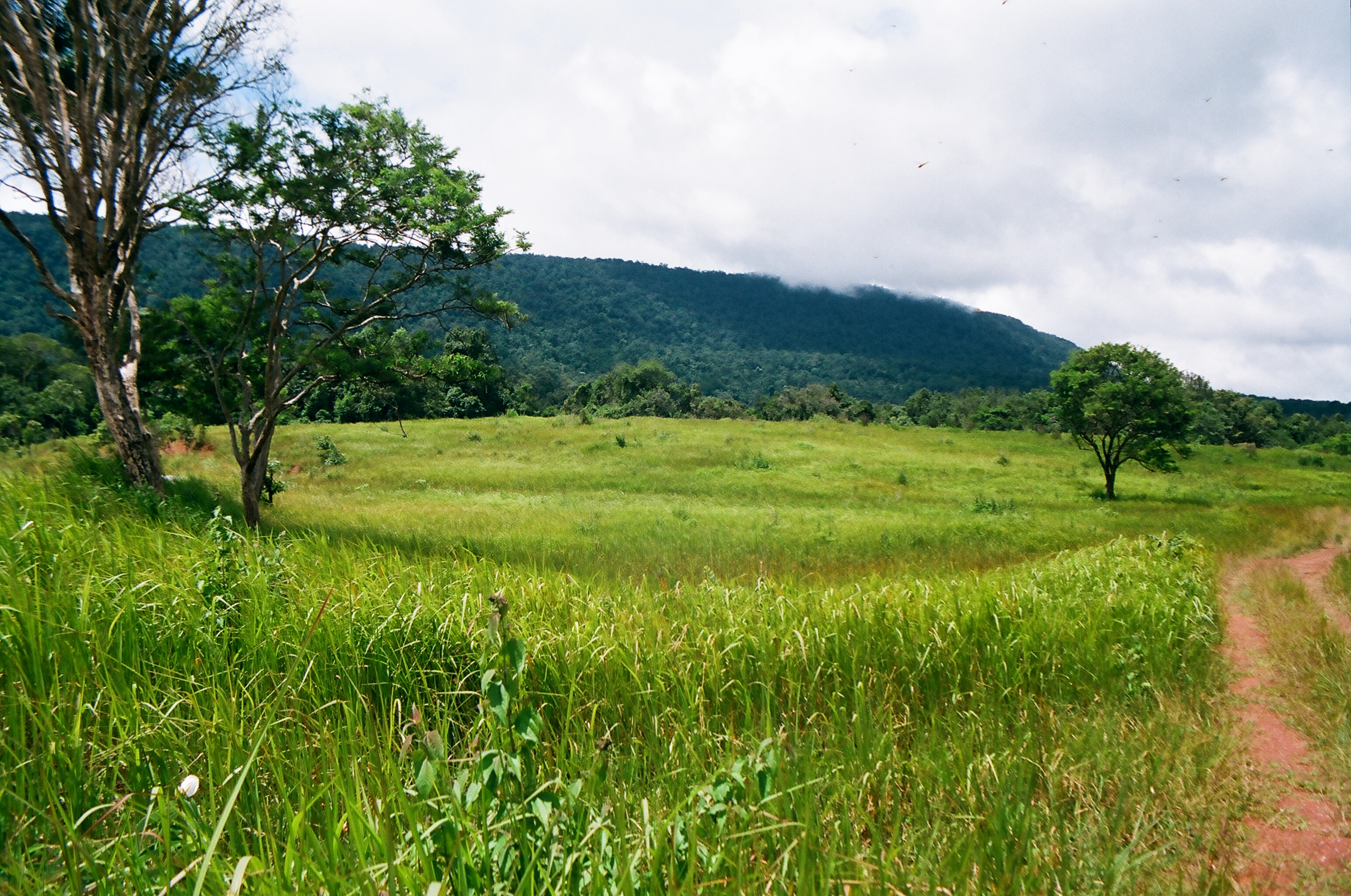 ทิวทัศน์ของเขาเขียว มองจากริมถนนทางขึ้นเขาเขียว